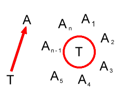 Darstellung der Wirkungsweise von subjektiven Rechten (rot) mit Träger (T) und verpflichtetem Adressaten (A). Links ein relatives, rechts ein absolutes Recht.